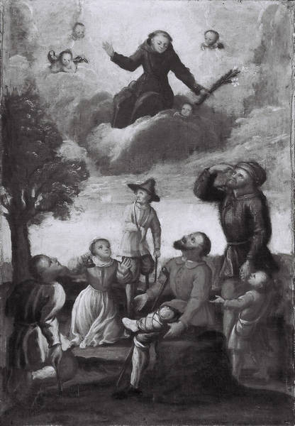 Der heilige Antonius als Schutzherr der Verstoßenen